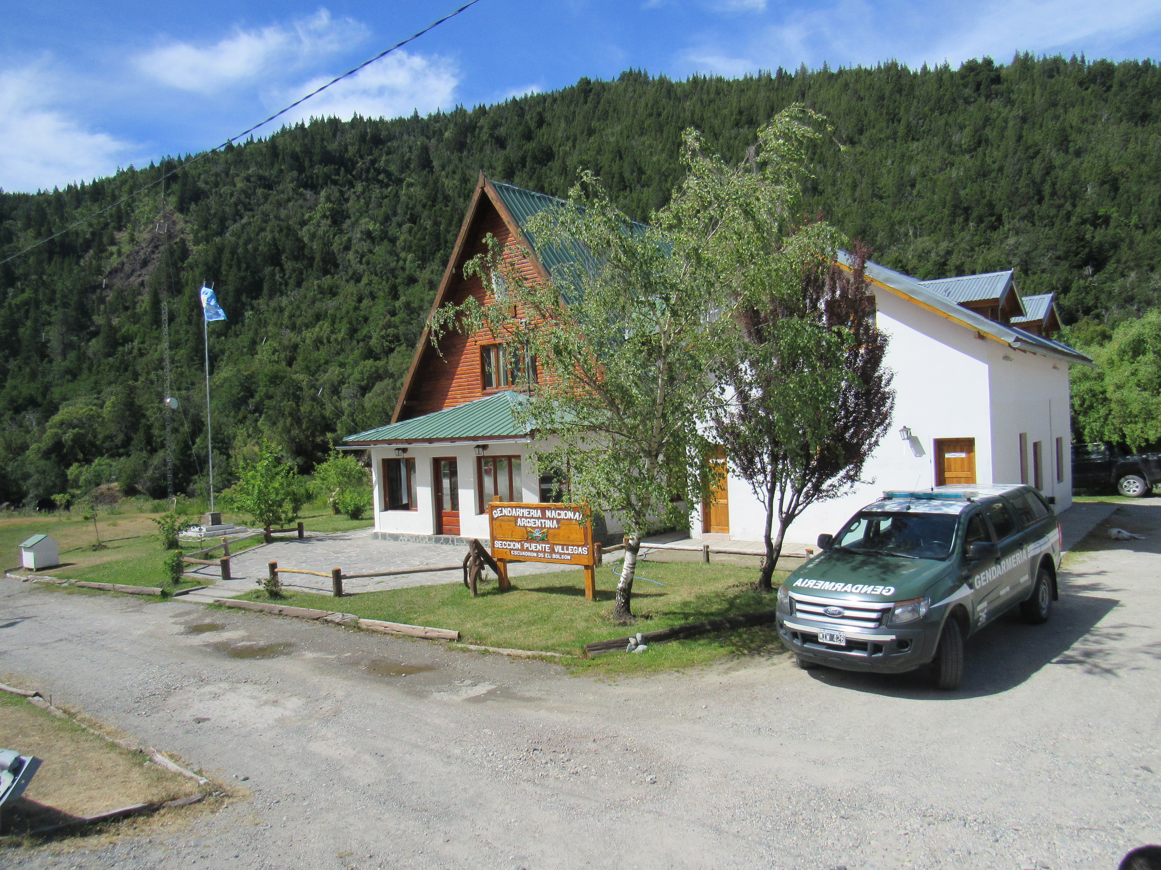 Gendarmeria Nacional Argentina sección Puente Villegas